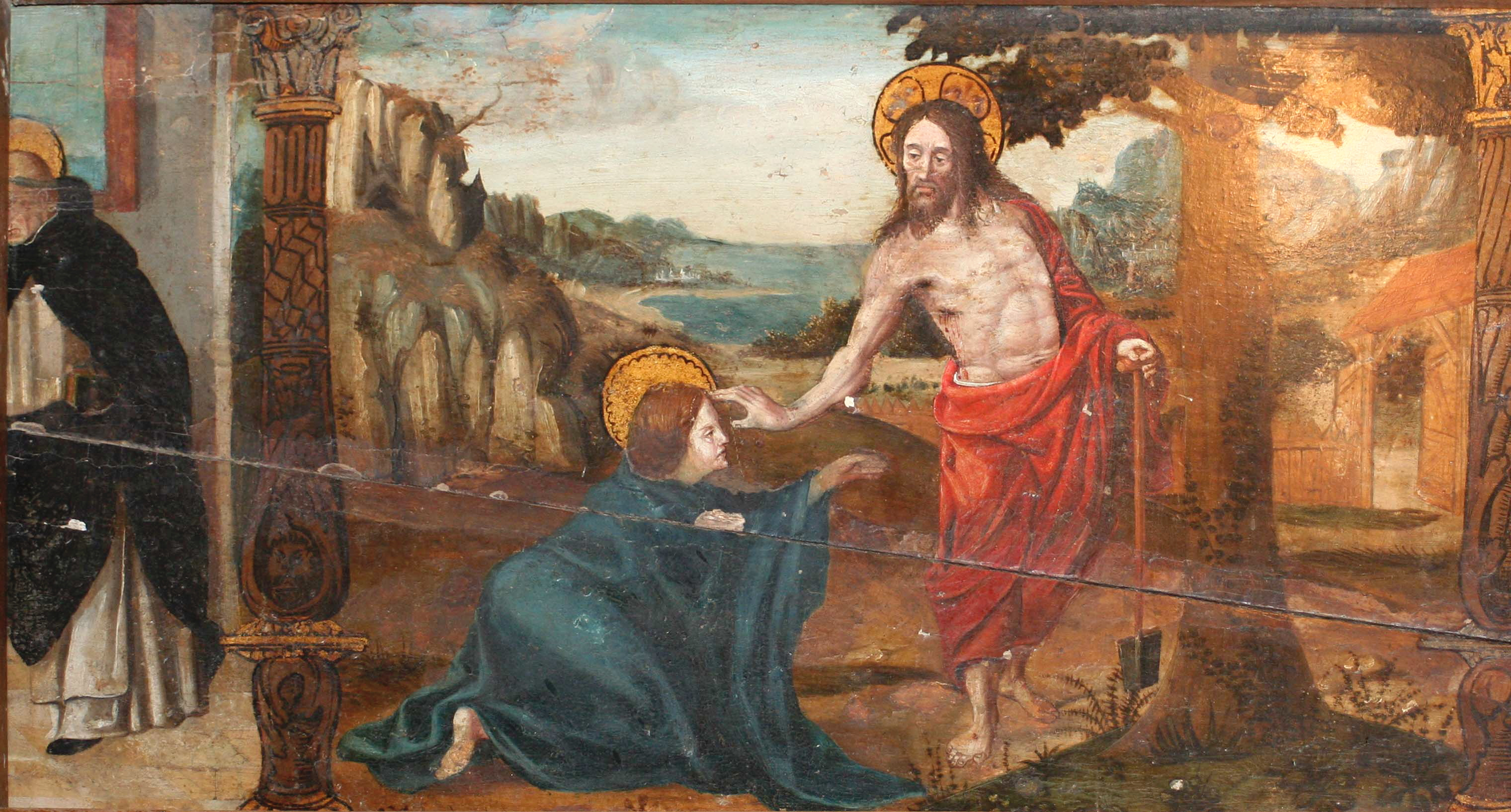 Partie d'une prédelle représentant le "Noli me tangere". Peinture sur bois (chêne) du XV° siècle se trouvant dans la chapelle Saint Eloi de la basilique de Saint-Maximin dans le département du Var (France).